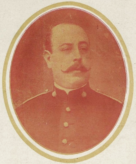 D. Luis Tur y Palau, e diputado a Cortes por Ibiza, nombrado gobernador civil de Pontevedra.